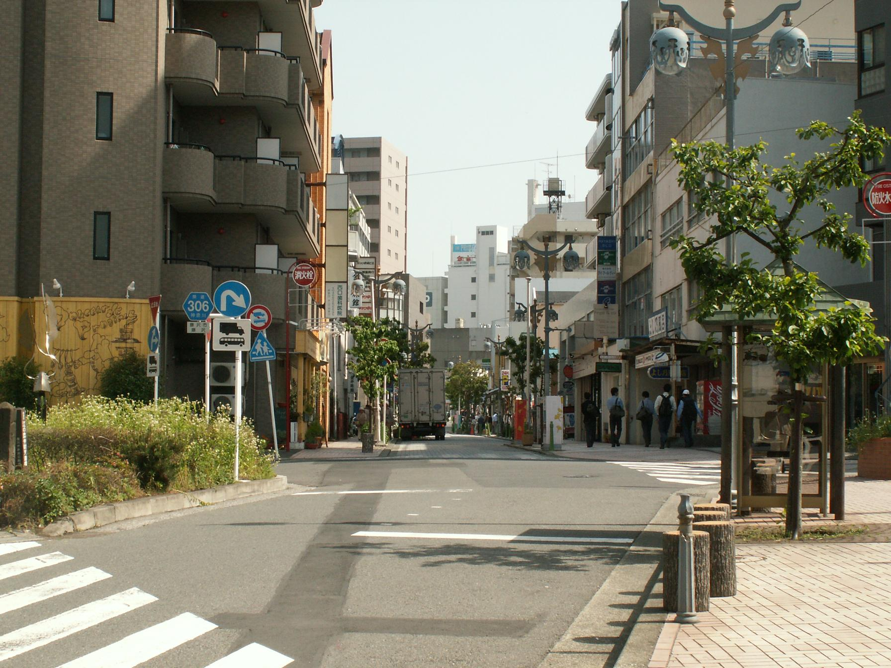 神奈川県道306号藤沢停車場線起点